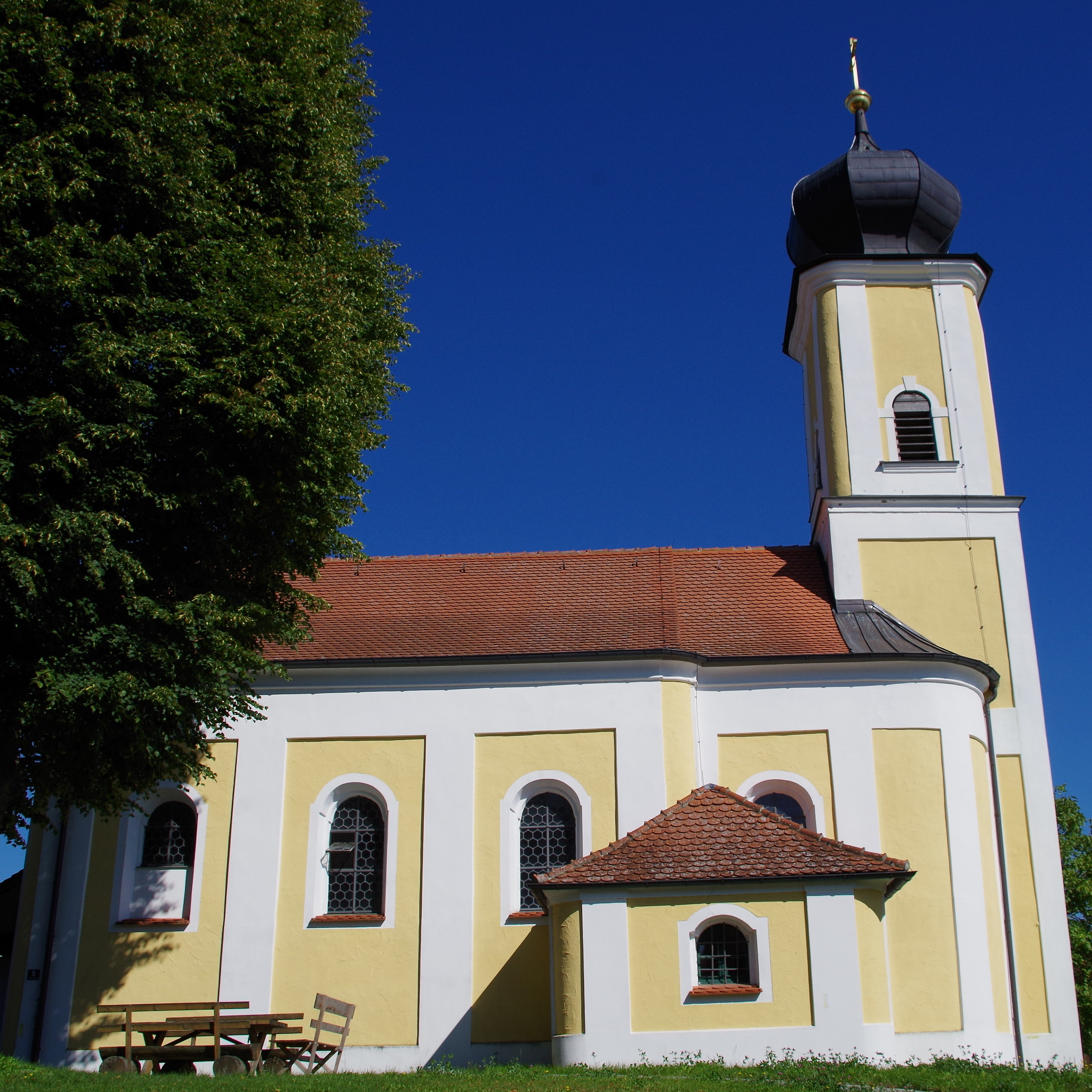 St. Laurentius - Albertshofen